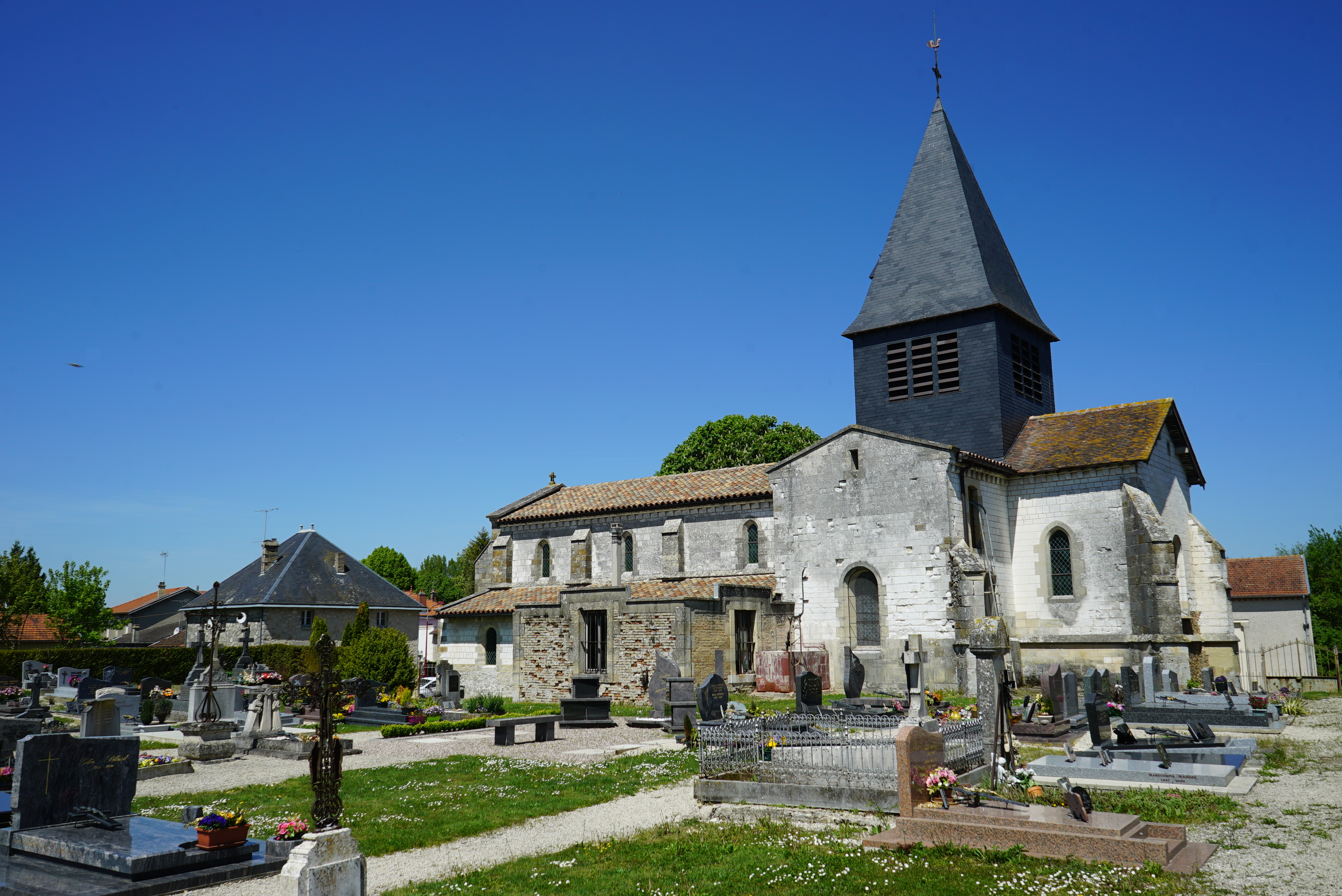 image de l'église.